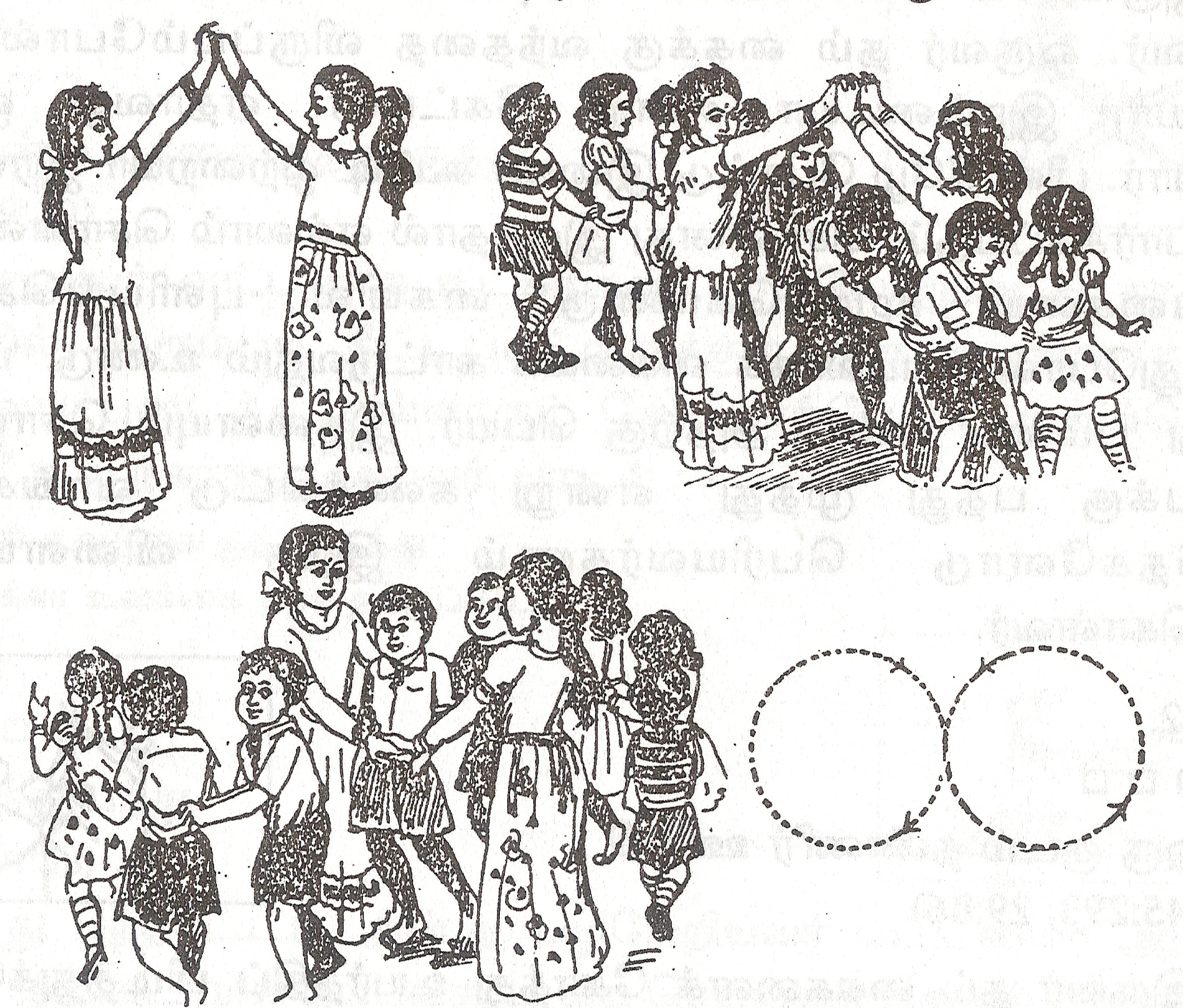 தமிழ்